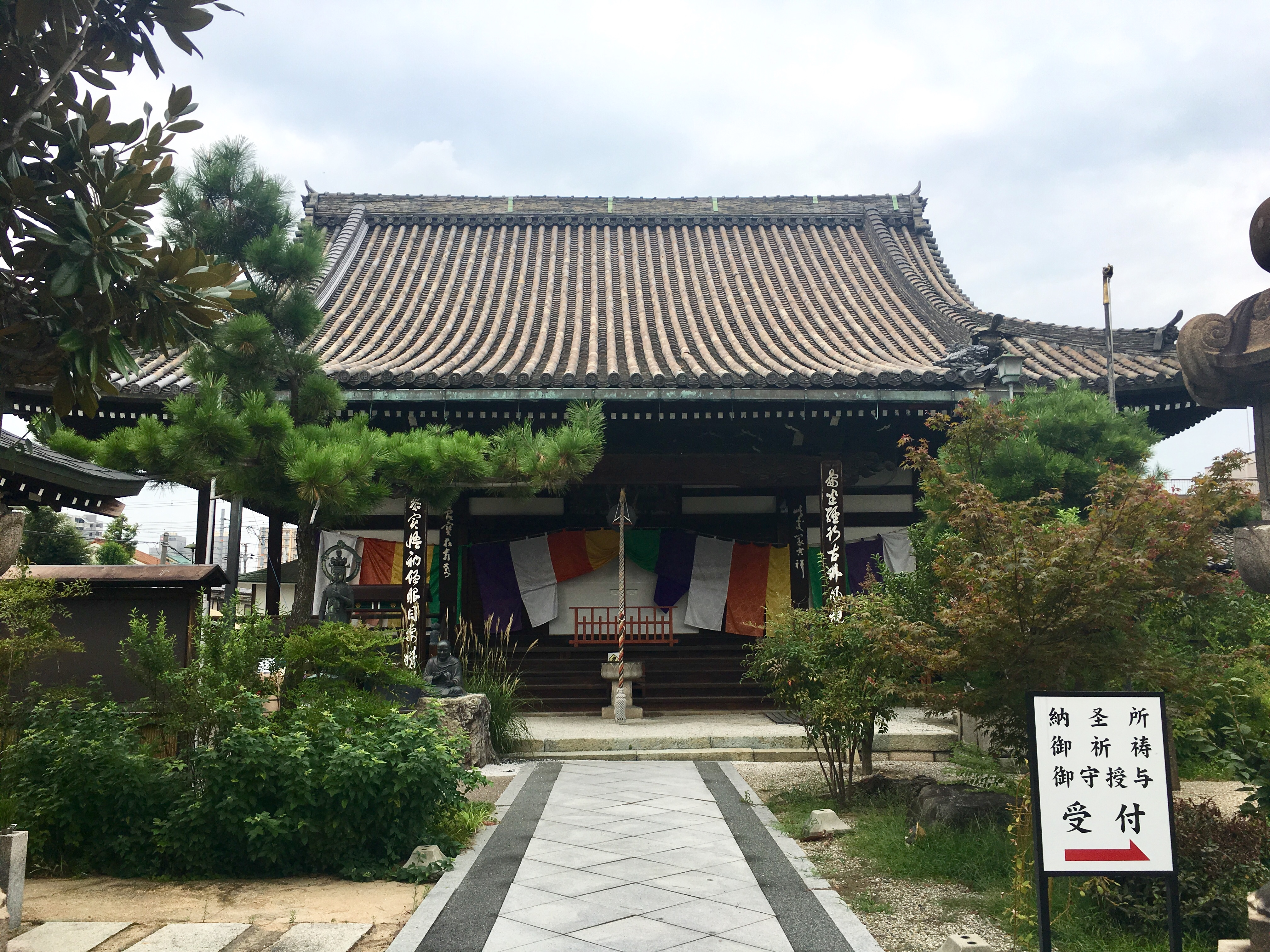 2019年8月、長栄寺で撮影。